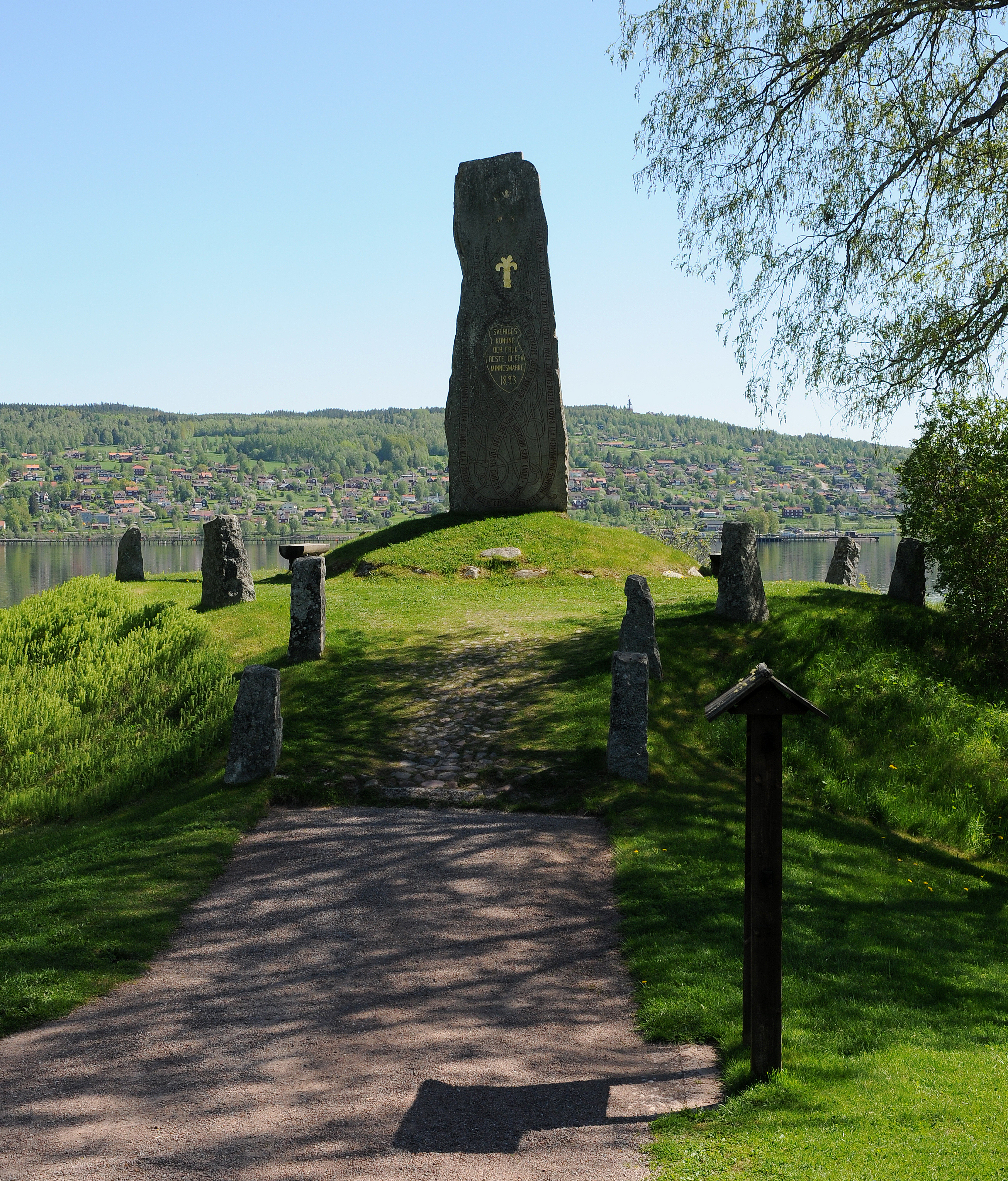 Vasamonumentet i Rättvik. Formgivet av Nils Nordén